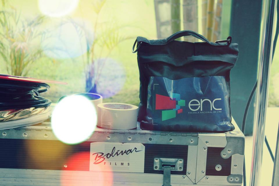 Estudiantes e instalaciones Escuela Nacional De Cine